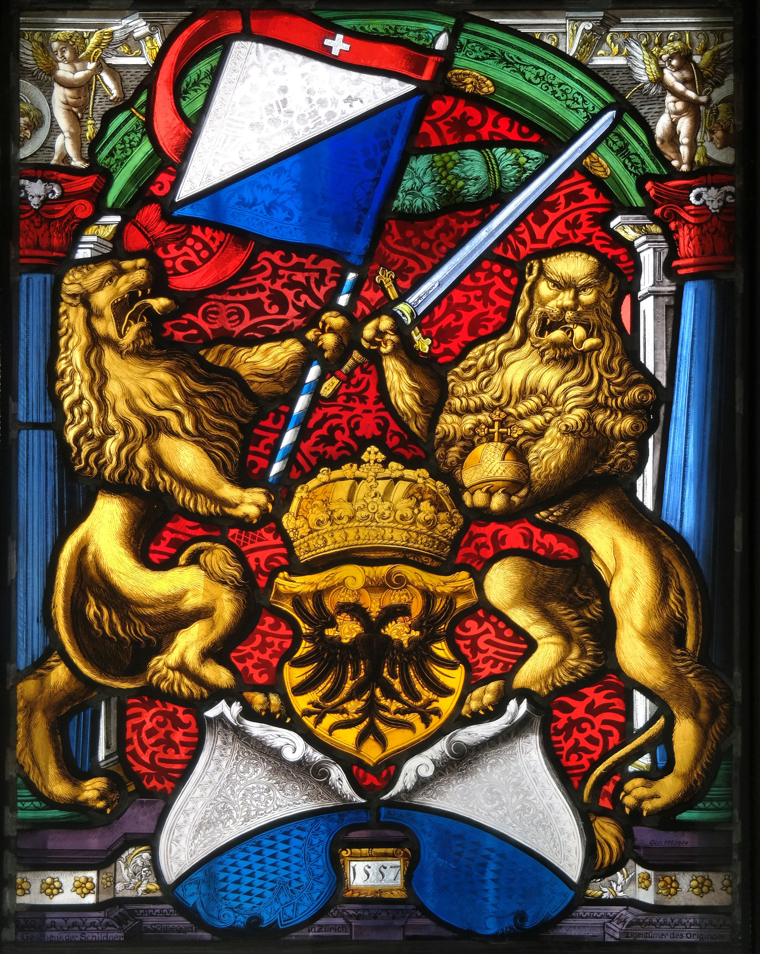 Wappenscheibe der Stadt Zürich. Details aus dem 1557 vom Stand Zürich gestifteten Glasfenster im Kreuzgang des Klosters Muri.